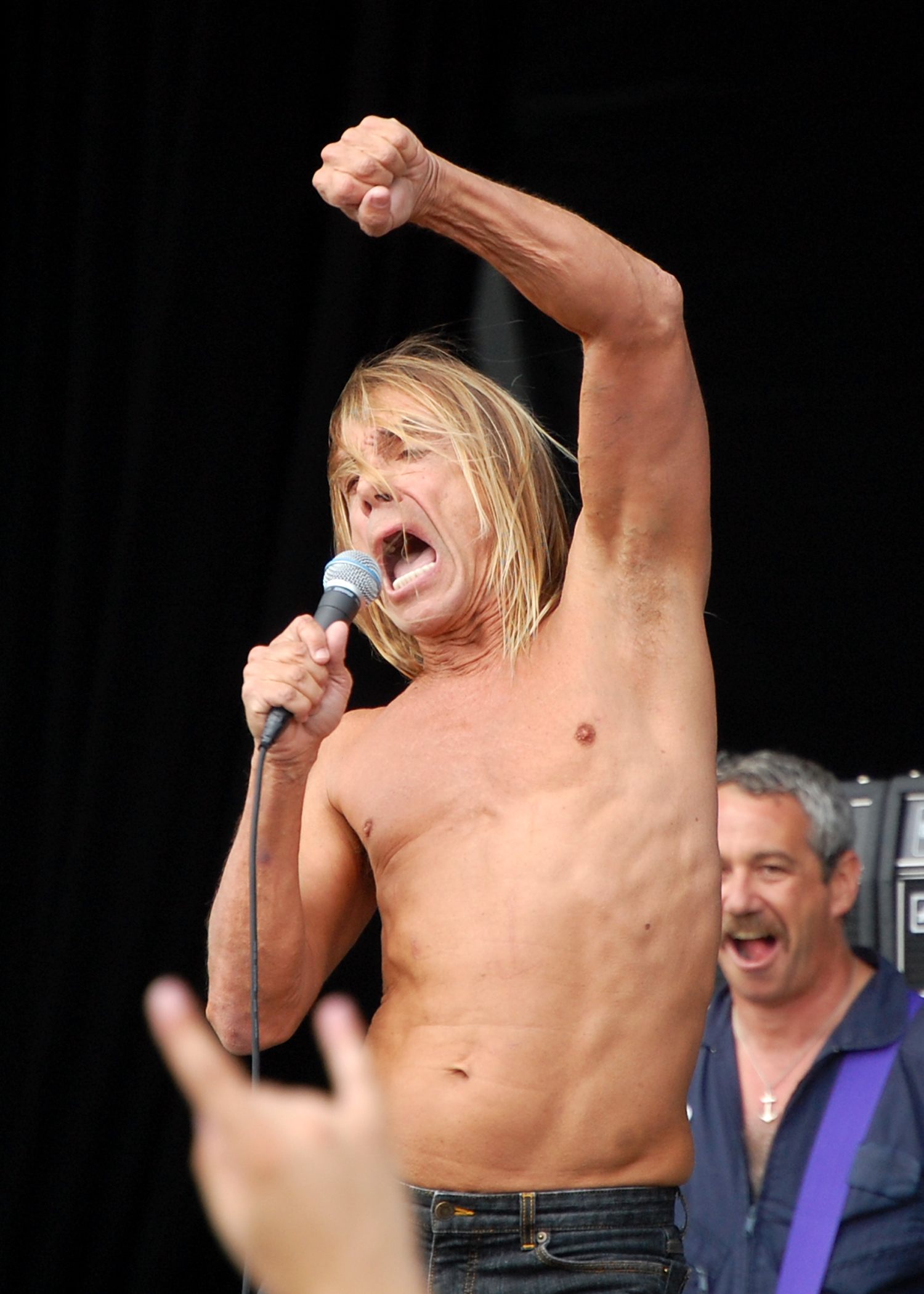 Iggy Pop